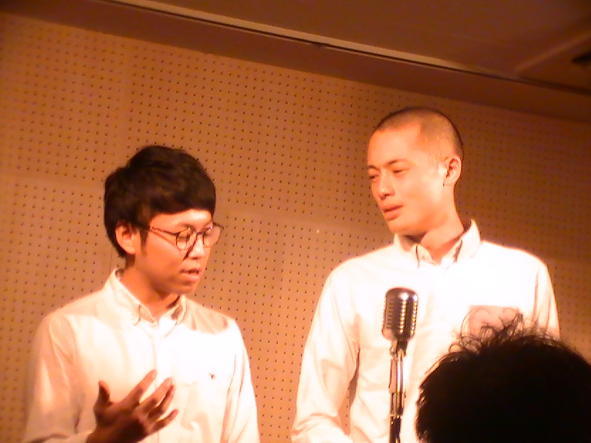 バッドナイス (2016年10月6日)